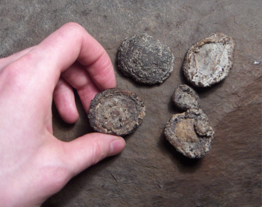 Järvimalmia suomalaisesta järvestä Rautamies 21:55, 19 February 2007 (UTC)